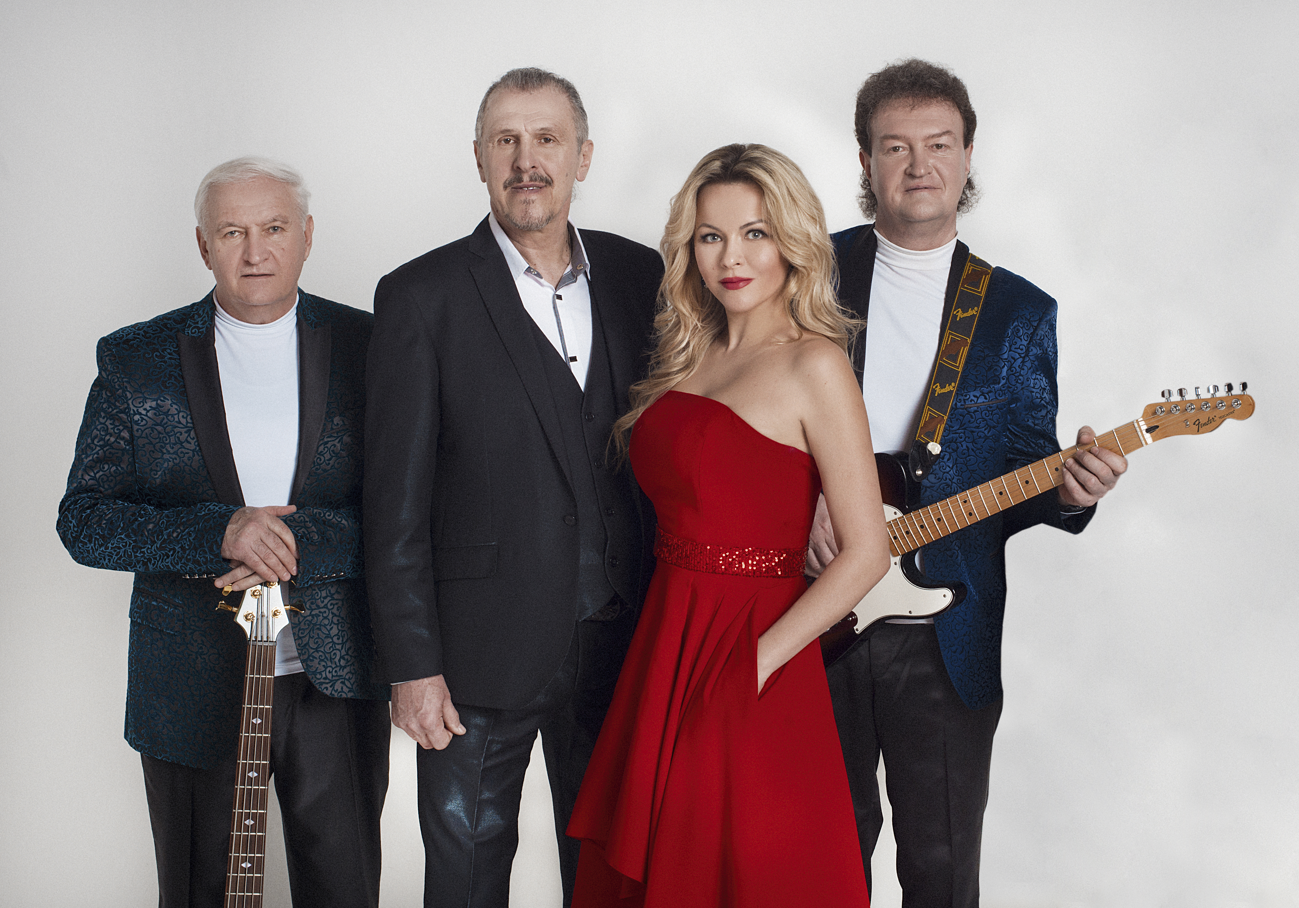 ВИА «Пламя» под руководством Юлии Ариничевой.